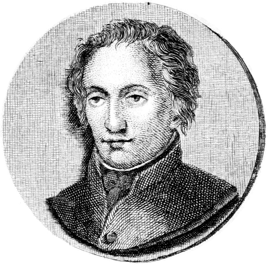 Aurelio Bertola De' Giorgi